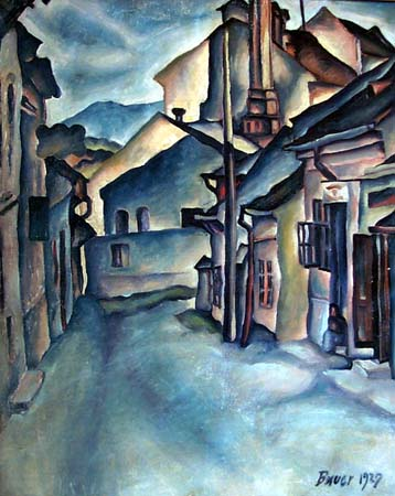 Česky: Ulička